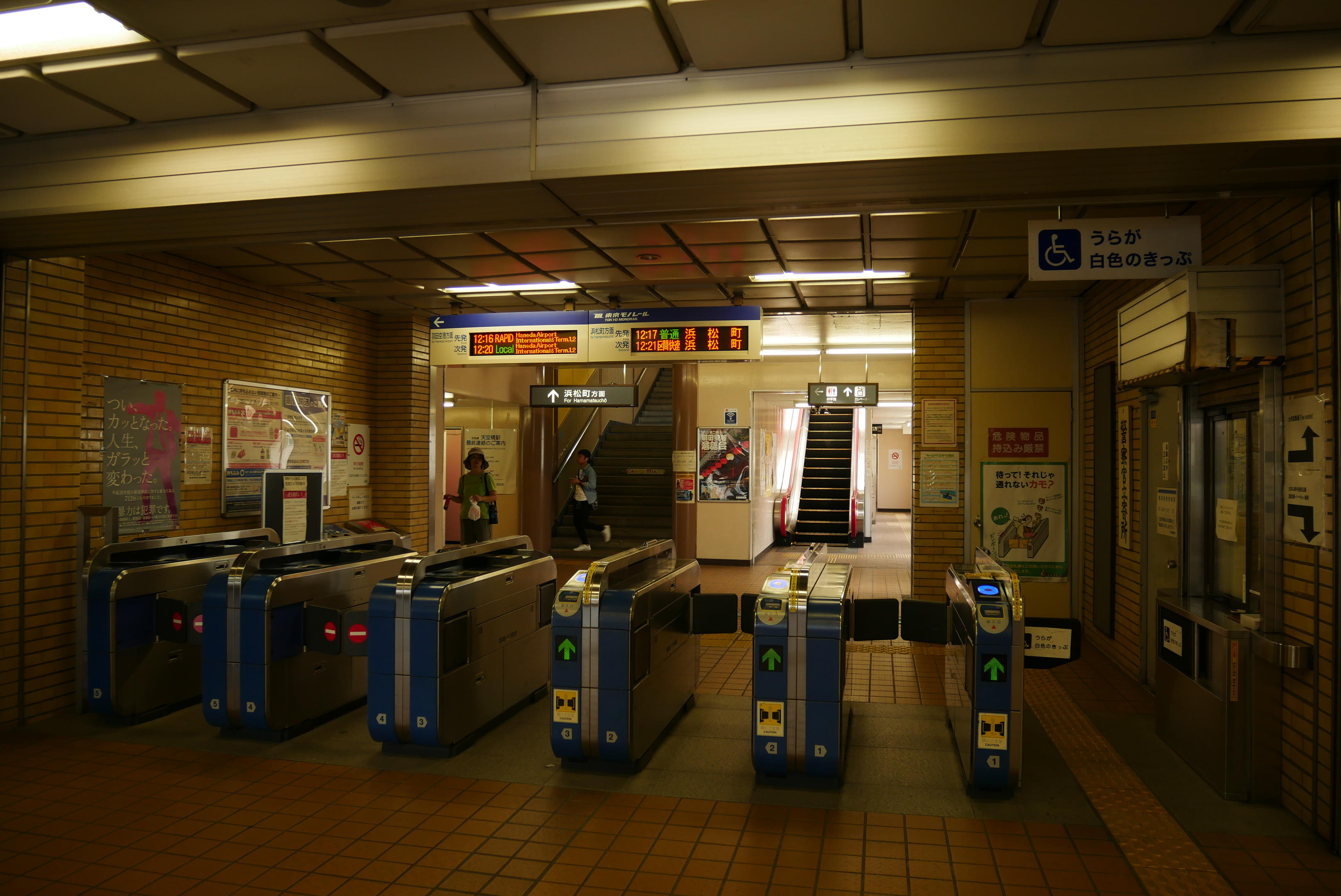 Ōi Keibajō-mae Station (大井競馬場前駅)